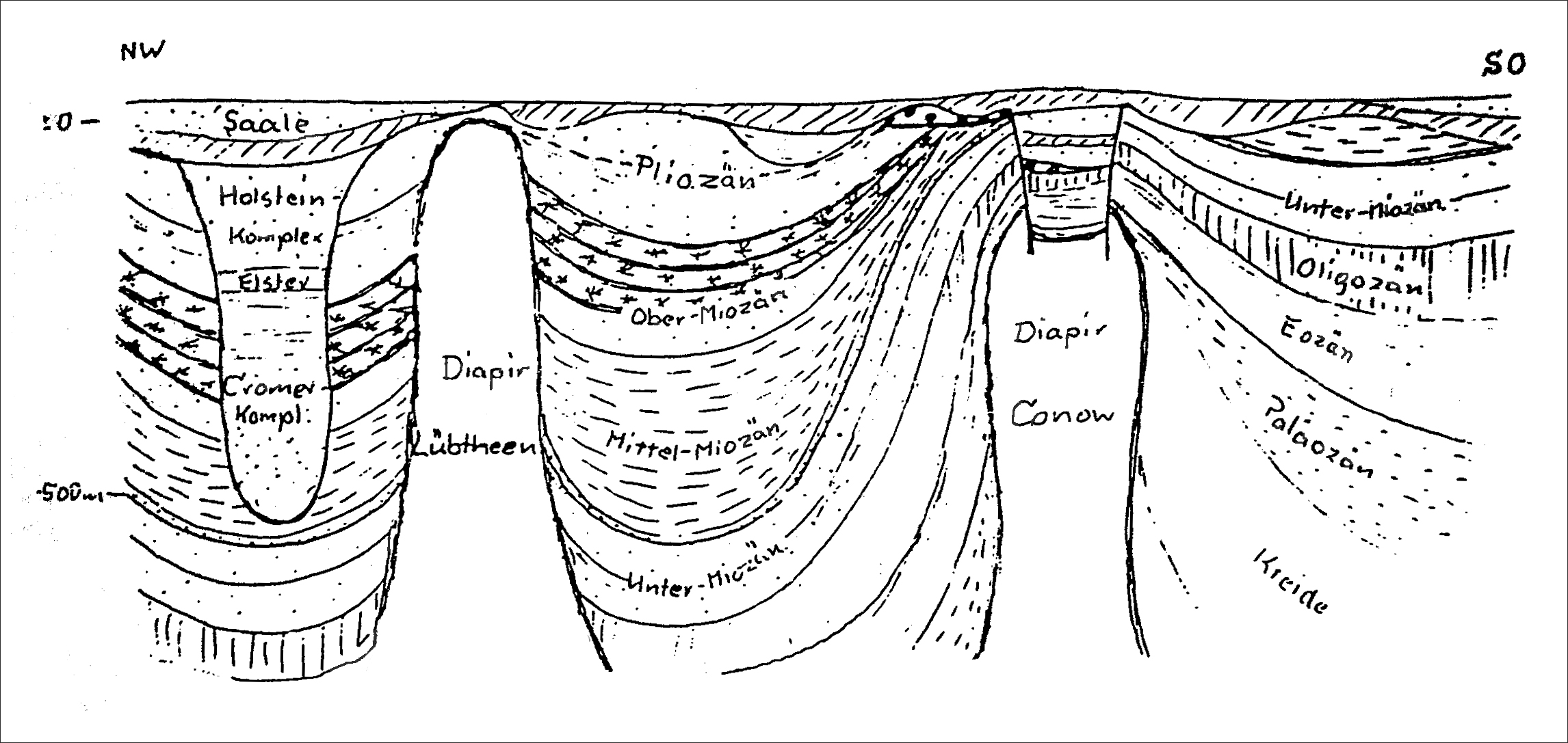 "Schematisierter und ca. 40-fach überhöhter Schnitt zur Situation im Untergrund der Griesen Gegend mit Salzdiapiren, der Randsenke Lübtheen, dem Einsturztrichter über dem Diapir Conow, der Diskordanz im obersten Pliozän und der übertiefen altpleistozänen Hagenower Rinne".